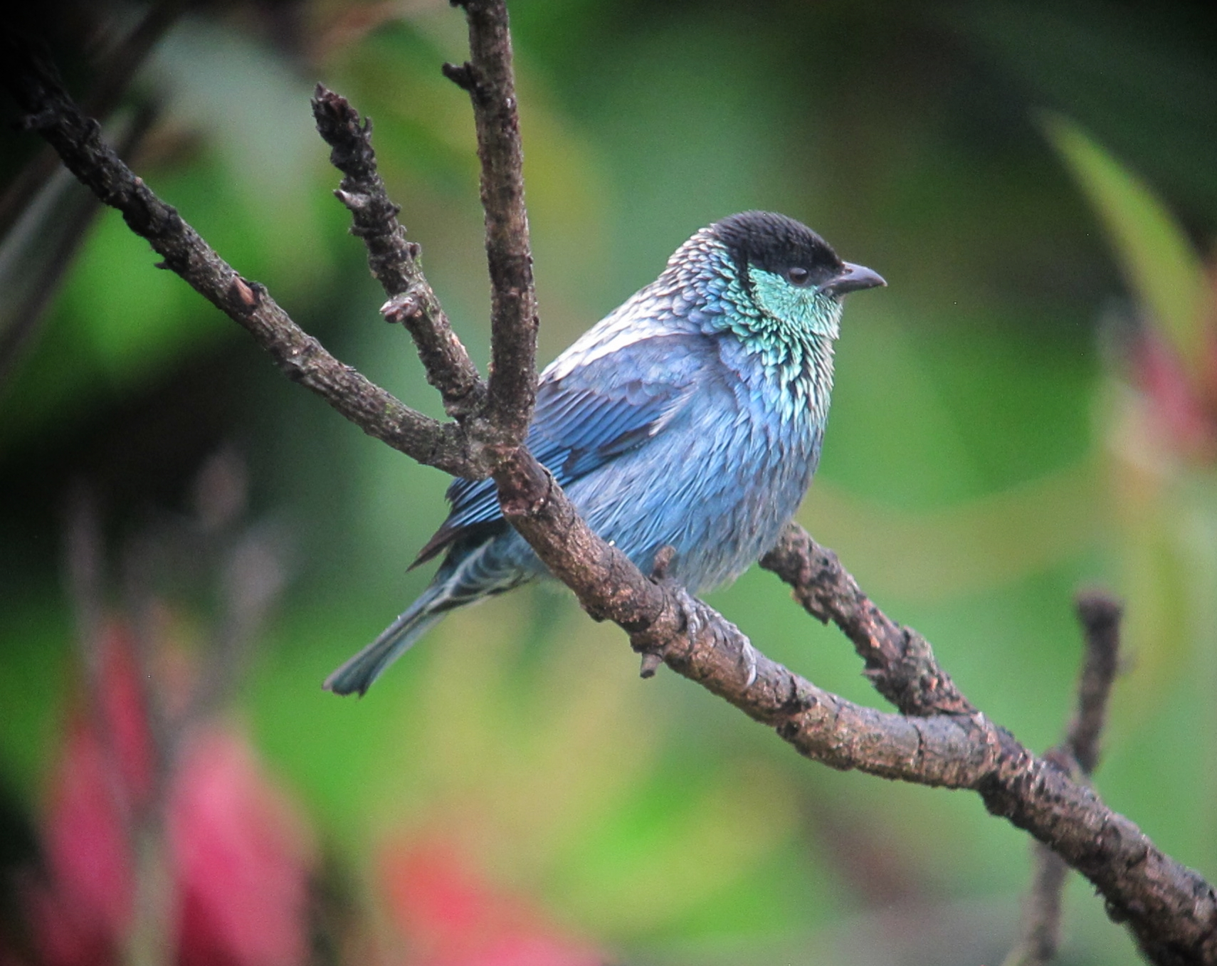 Circasia, Quindío, Colombia